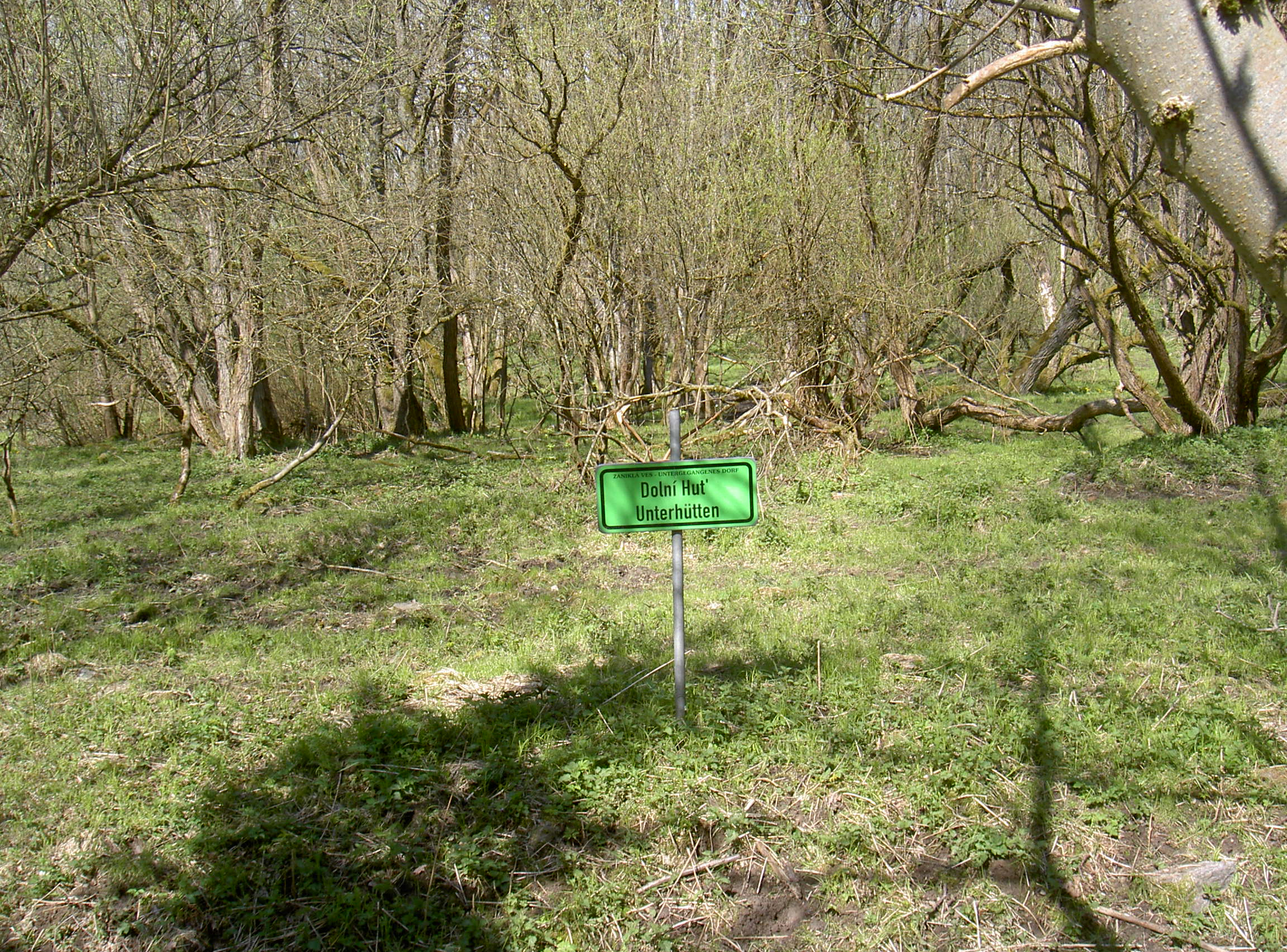 Unterhütten